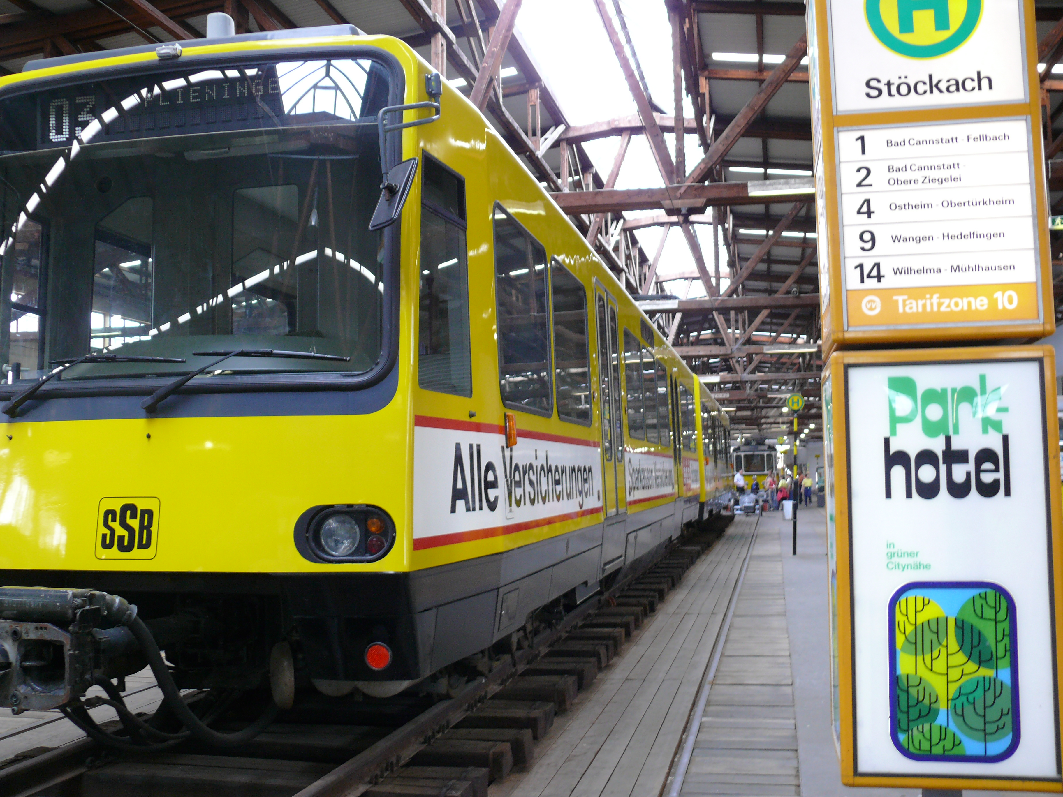 Die beiden Hälften 3001 & 3006 der DT8-Stadtbahnprototypen, hier noch im alten Stuttgarter Straßenbahnmuseum in Zuffenhausen.